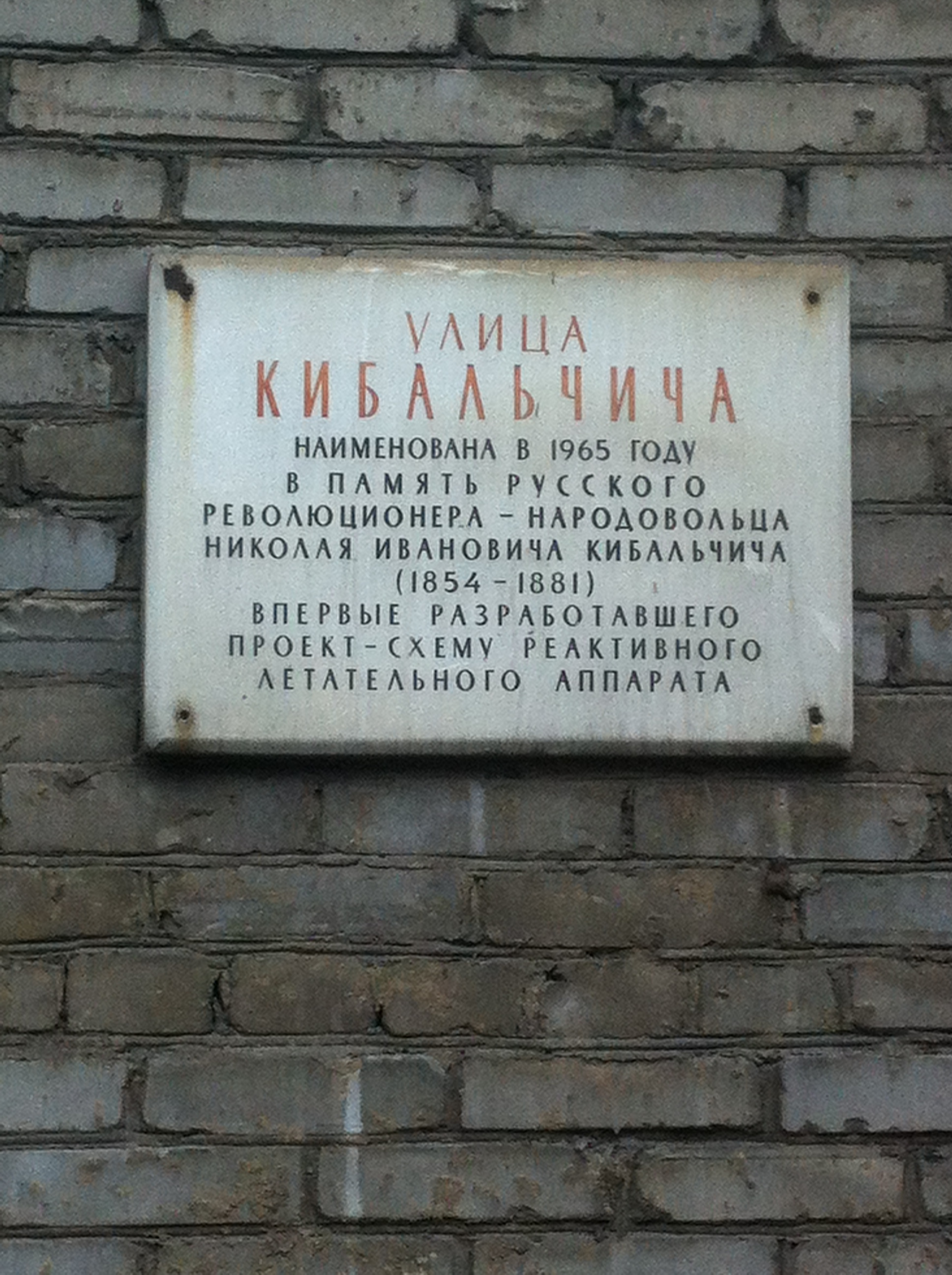 Мемориальная доска на улице Кибальчича в Москве, район СВАО.